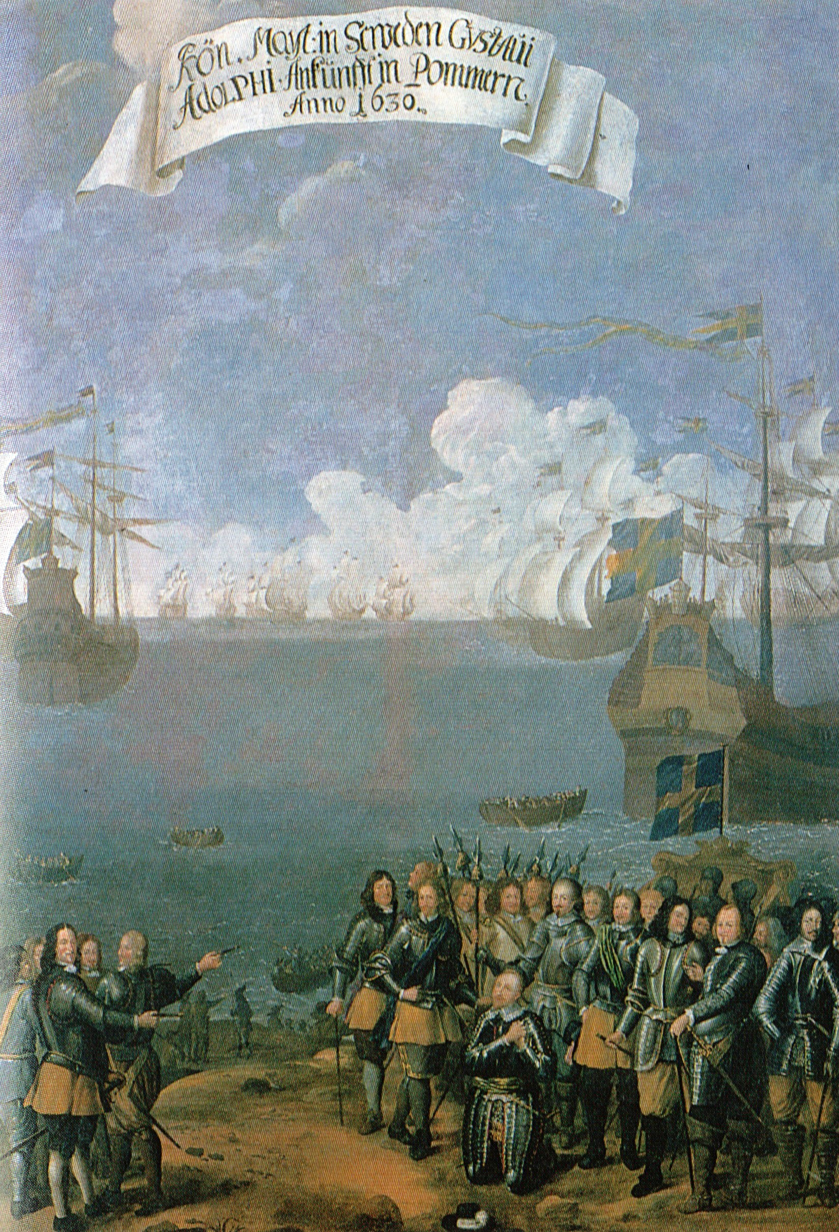 Ölgemälde von der Landung von König Gustav II. Adolf in Pommern 1630.